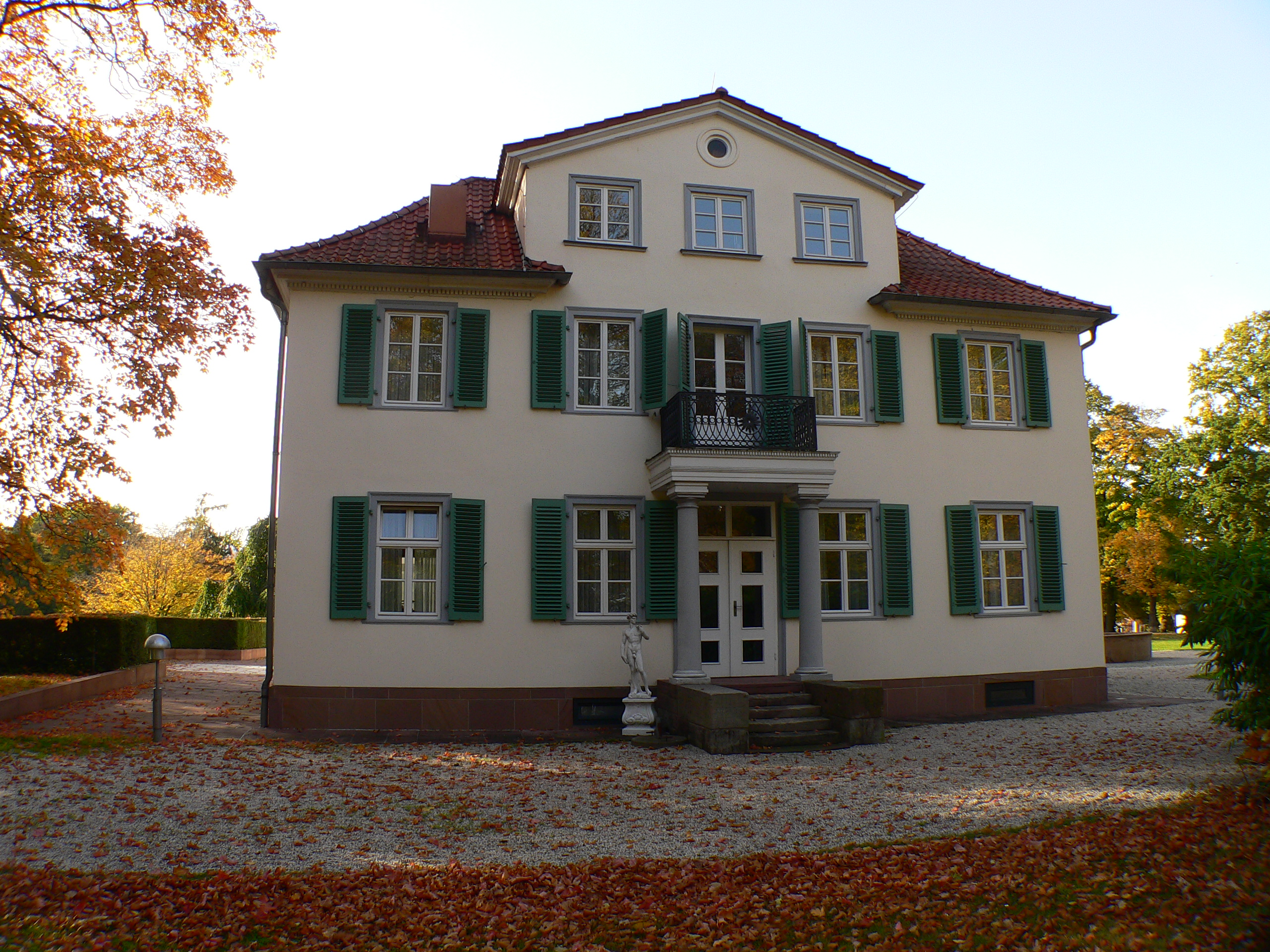 Schloss Schönfeld in Kassel-Wehlheiden, Hessen, Deutschland